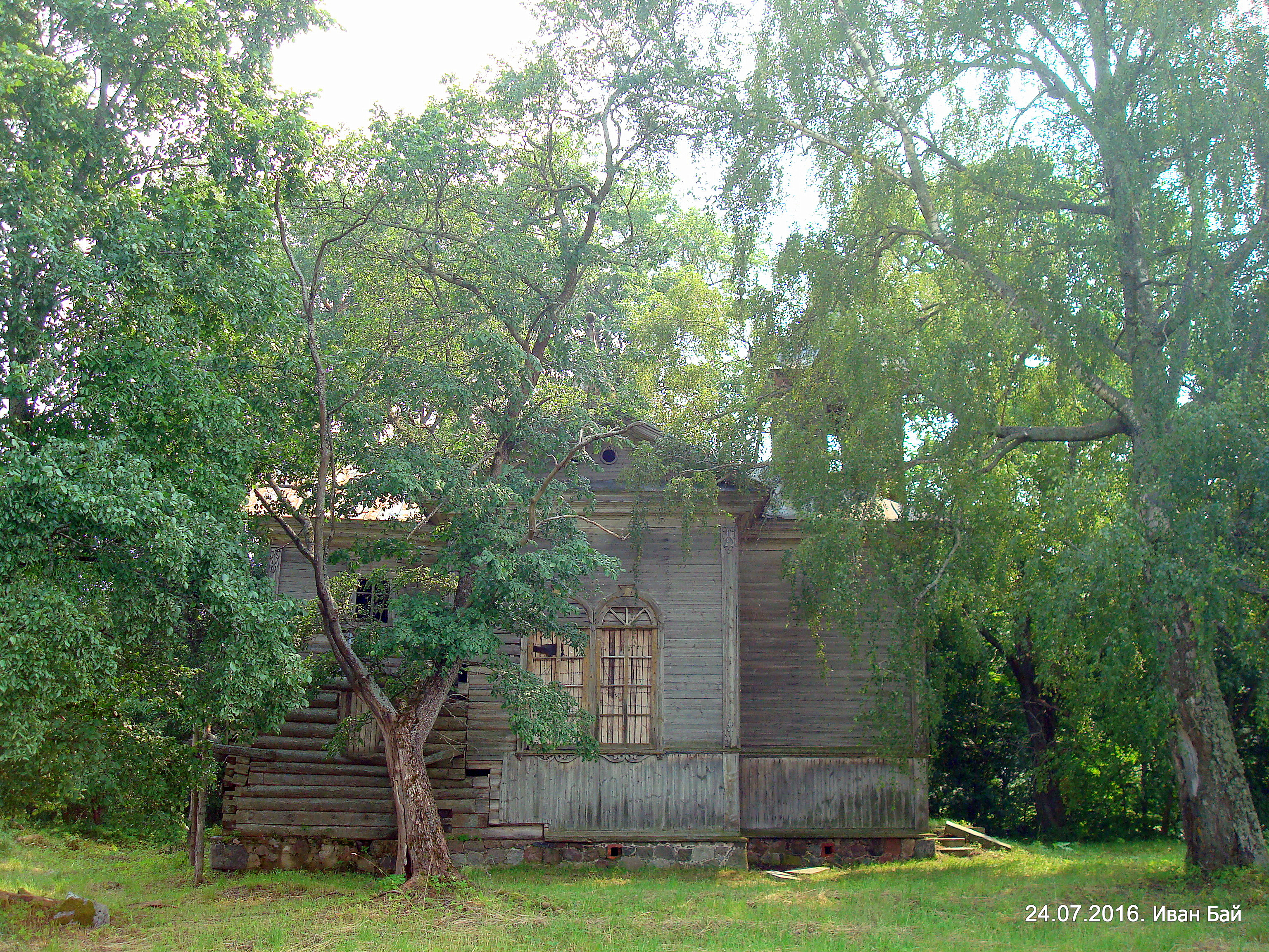 Боковой фасад костёла в Ремнях